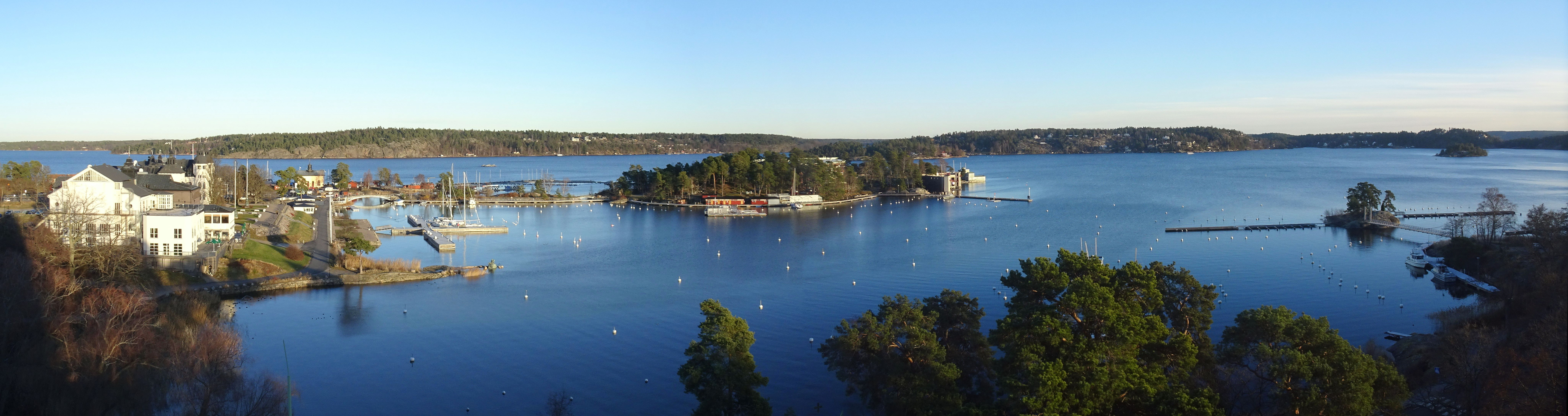 Baggensfjärden och Hotellviken från Grünewaldvillan